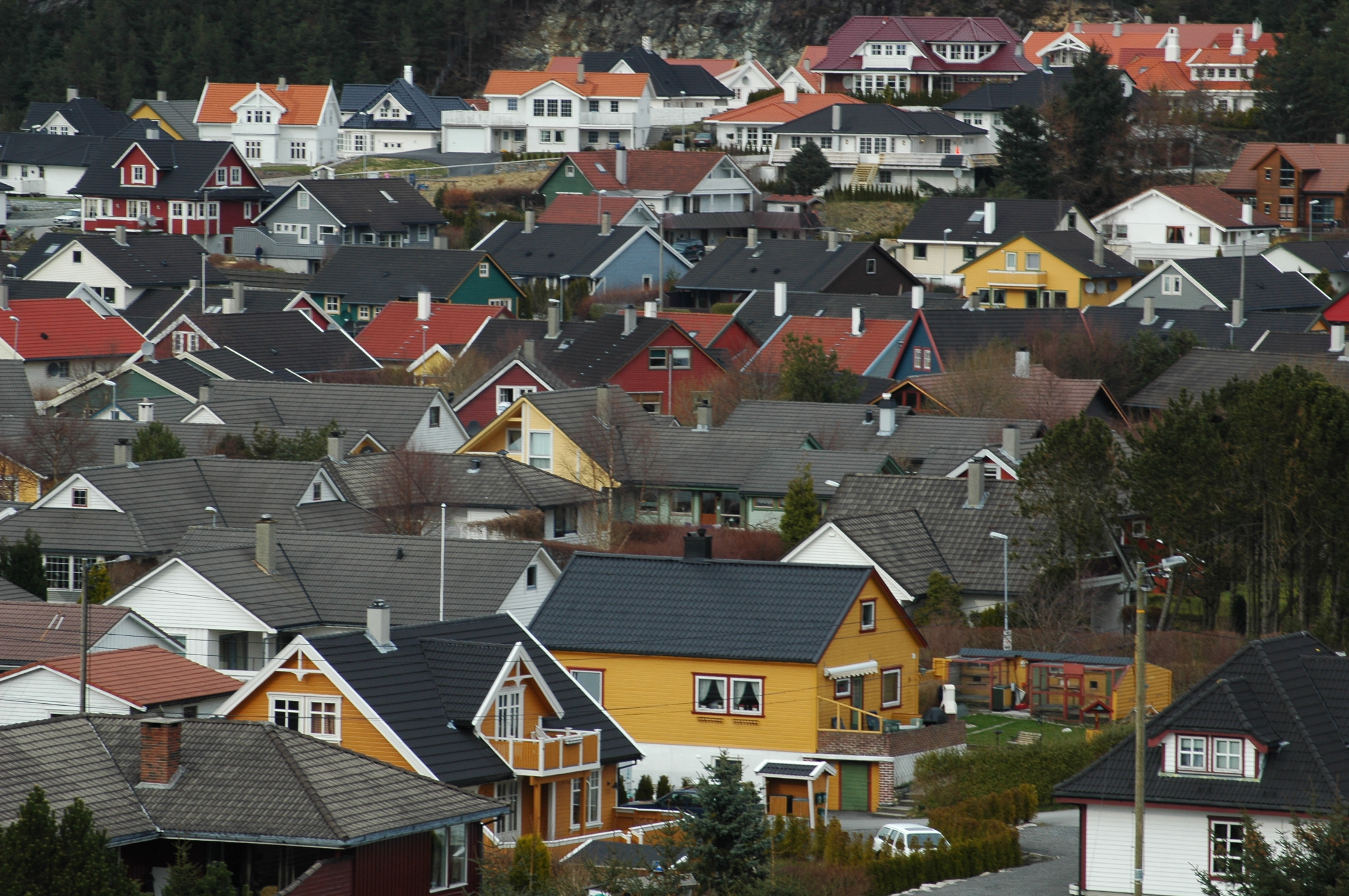 Bleikemyr, Hahugesund